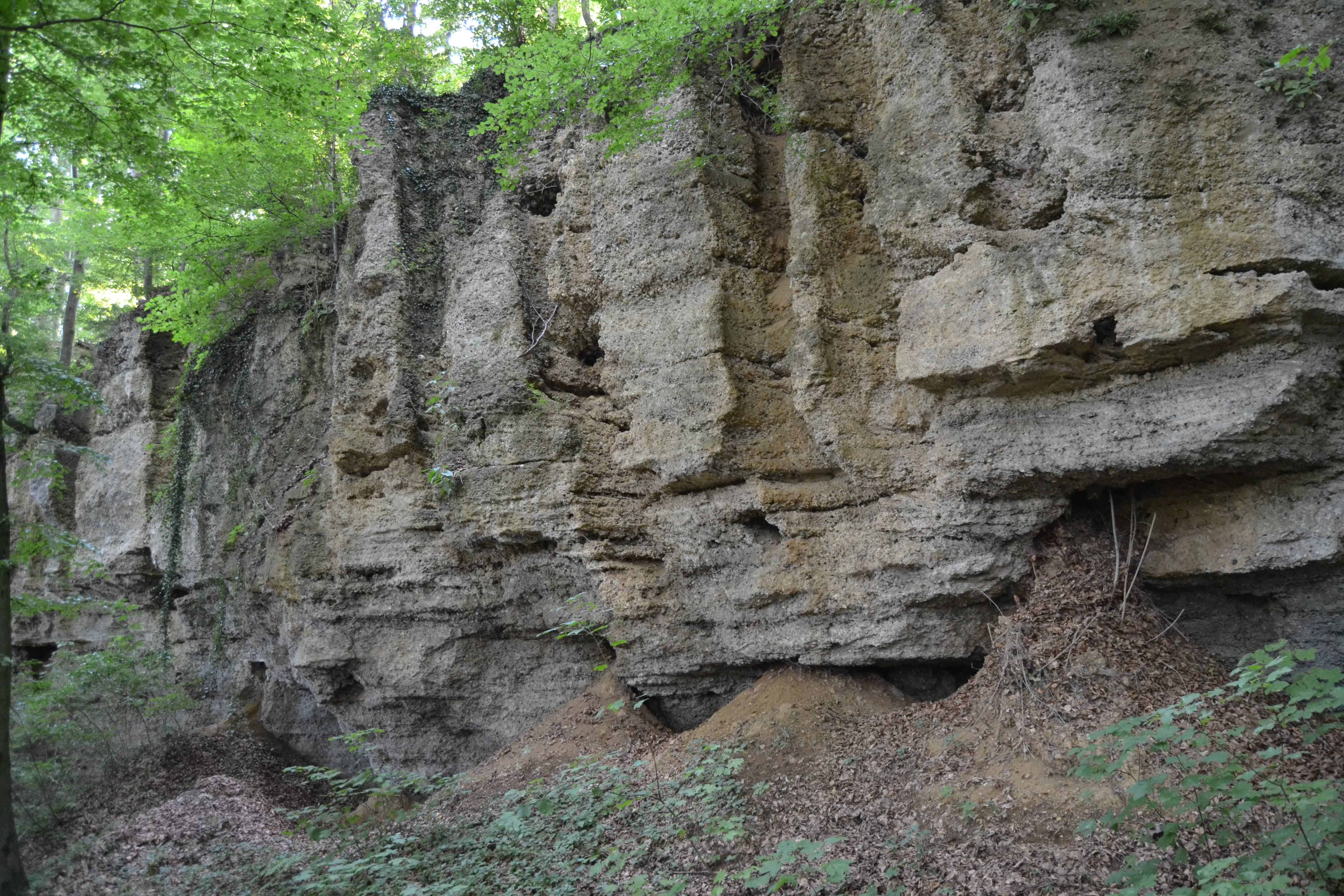 Ansicht von SO